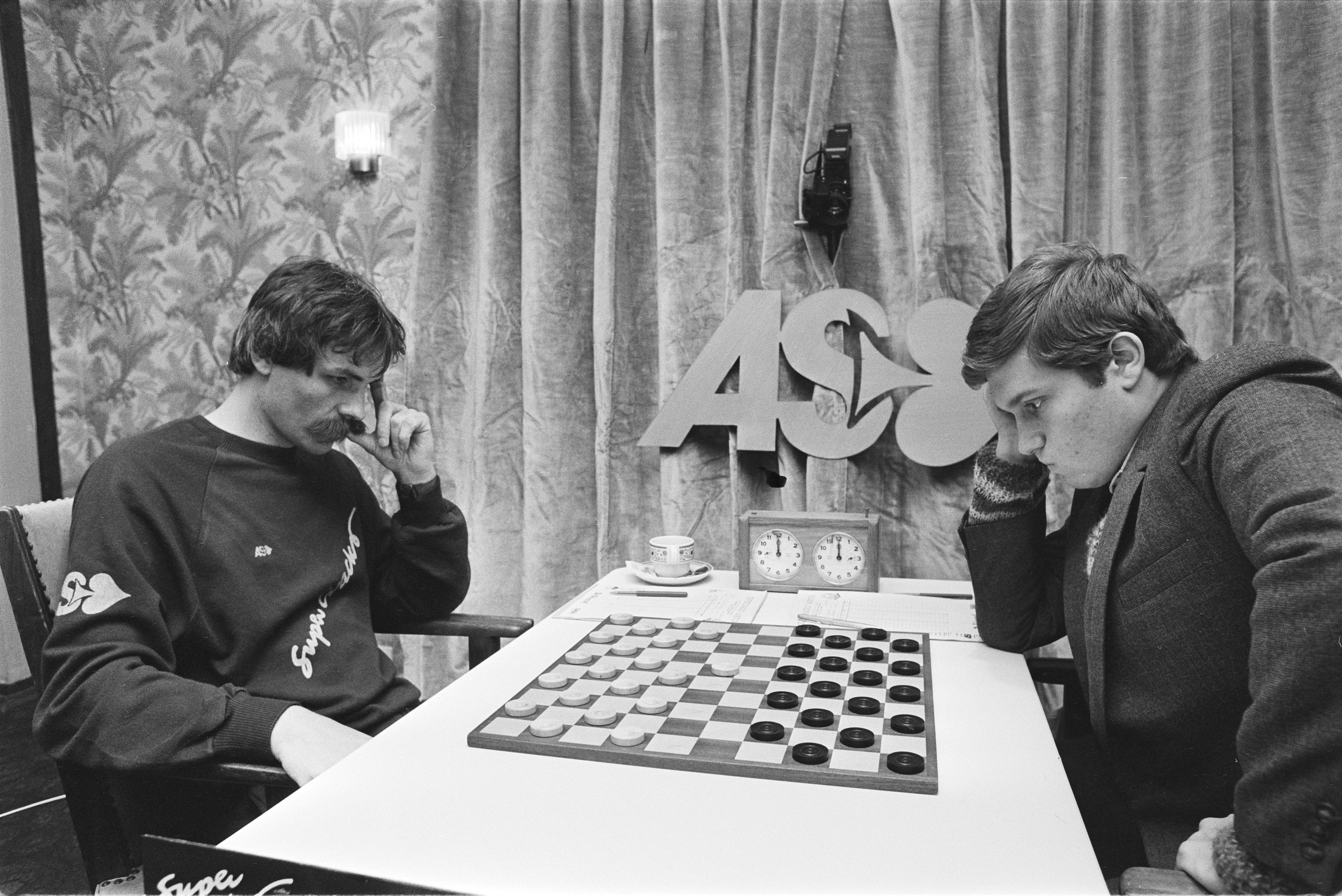 WK match tussen Wirny en Wiersma.